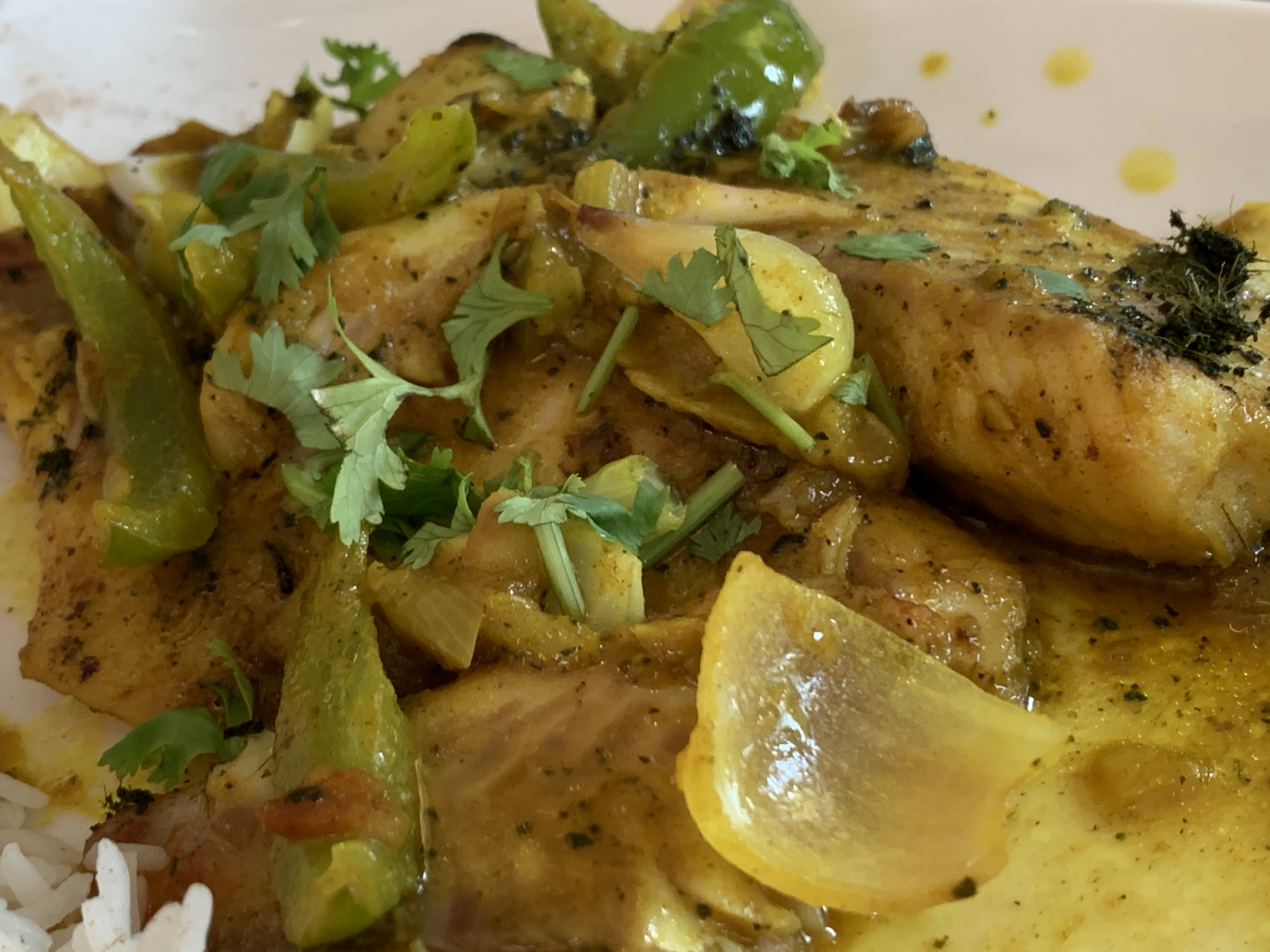 Aux Quatre Épices (Pamplemousses) - vindaye de poisson.